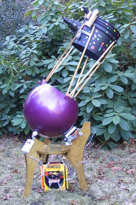 Trackball telescope